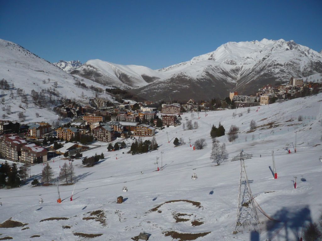 Les2Alpes